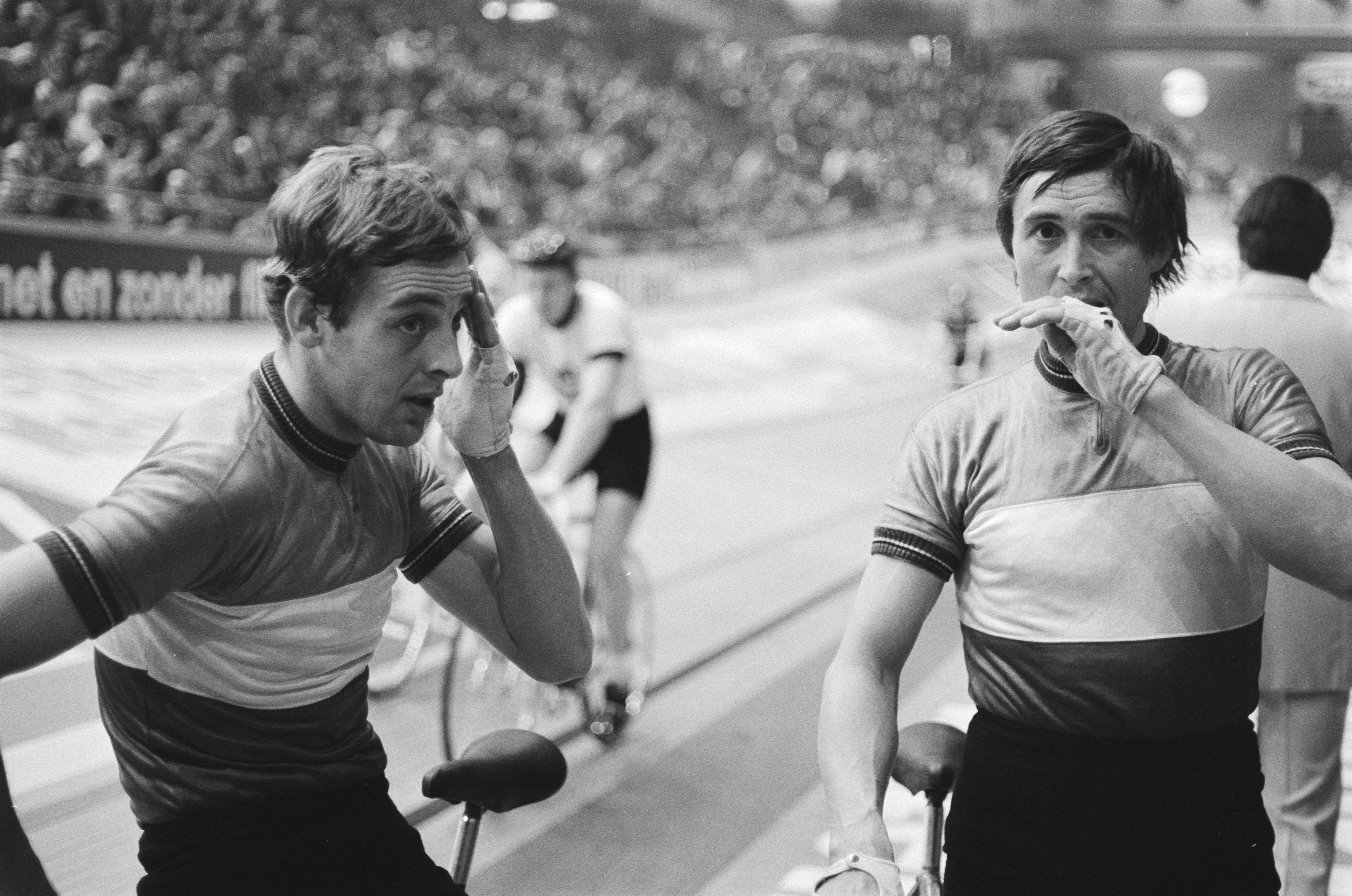 Collectie / Archief : Fotocollectie Anefo Reportage / Serie : [ onbekend ] Beschrijving : Zesdaagse in Rotterdam (wielrennen), wielrenners Roy Schuiten (l) en Gerben Karstens. Datum : 28 januari 1978 Locatie : Rotterdam, Zuid-Holland Trefwoorden : wielrennen, zesdaagse Persoonsnaam : Gerben Karstens, Schuiten, Roy Fotograaf : Peters, Hans / Anefo Auteursrechthebbende : Nationaal Archief Materiaalsoort : Negatief (zwart/wit) Nummer archiefinventaris : bekijk toegang 2.24.01.05 Bestanddeelnummer : 929-5476